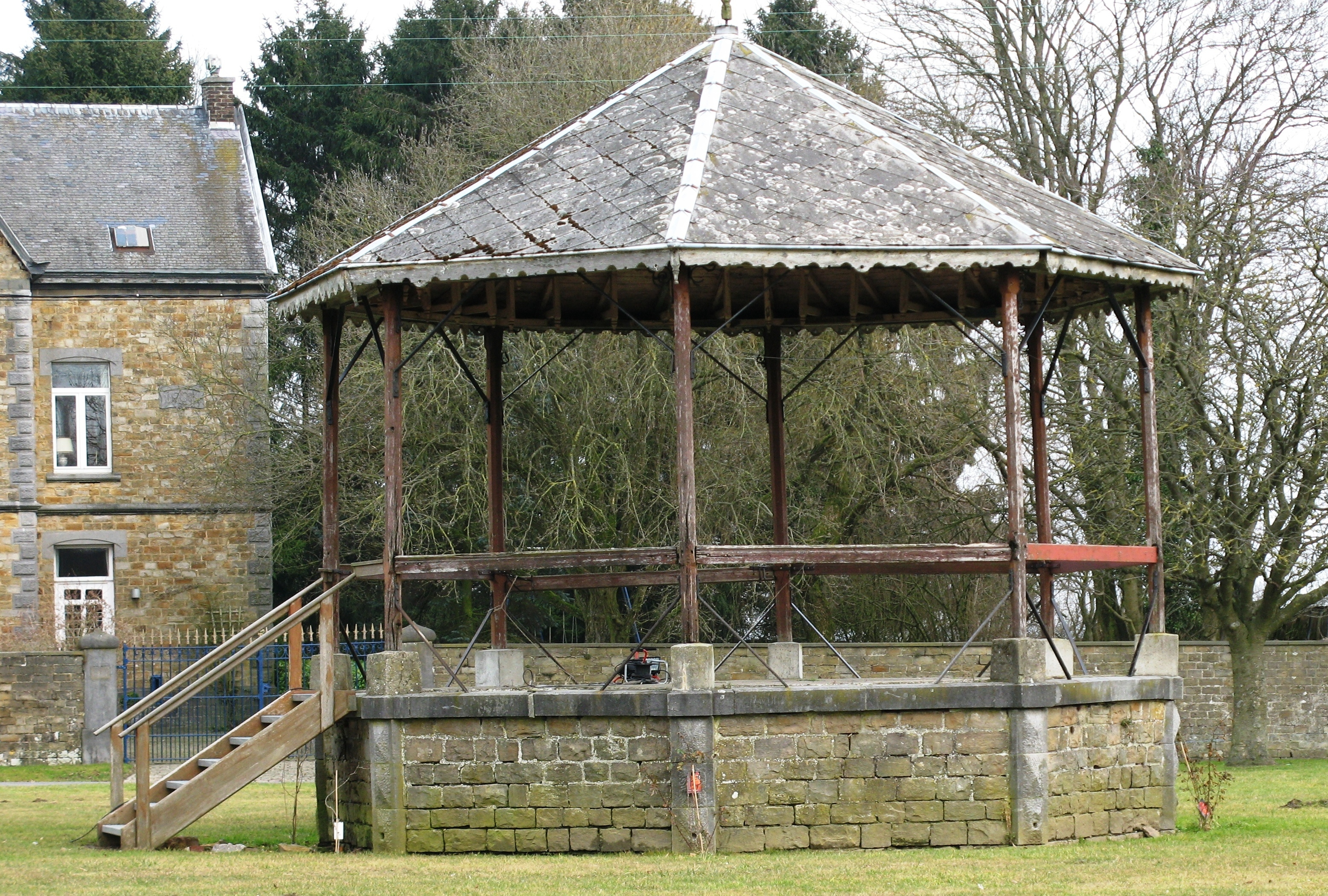 De Kiosk zu Grand Marchin.